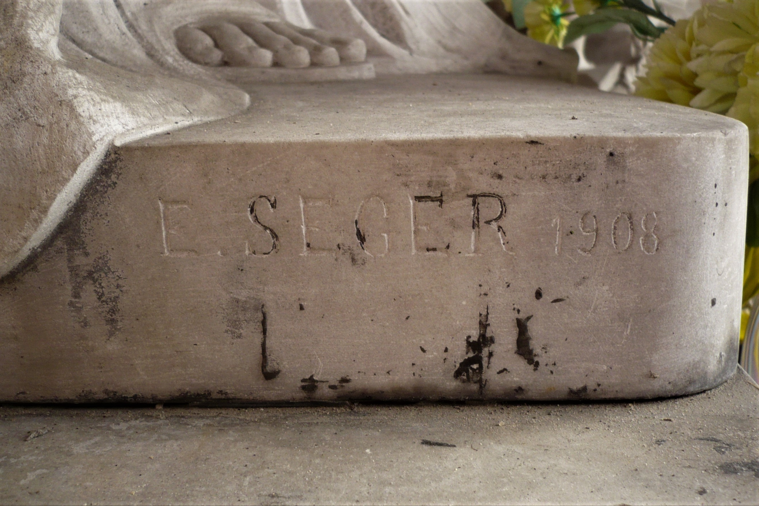 Figura Anioła w grobowcu Rodziny Rose, postument z podpisem rzeźbiarza